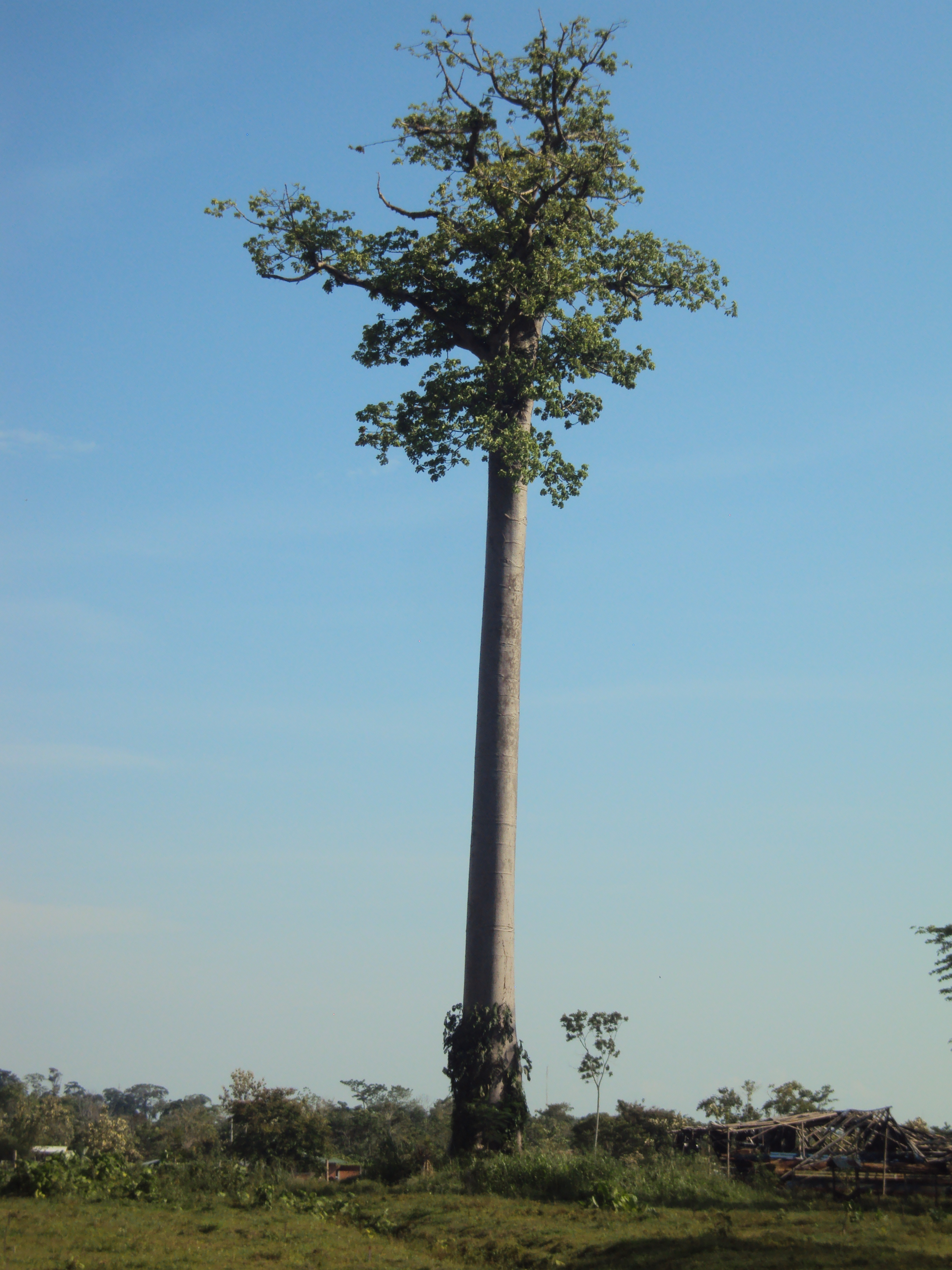 Cavanillesia platanifolia de 45 mts, tomada en la región de Urabá, Antioquia, Colombia